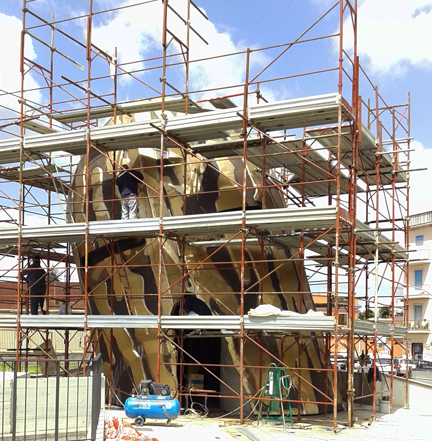 FIERAMOSCA info-point monument fase di montaggio anno 2016